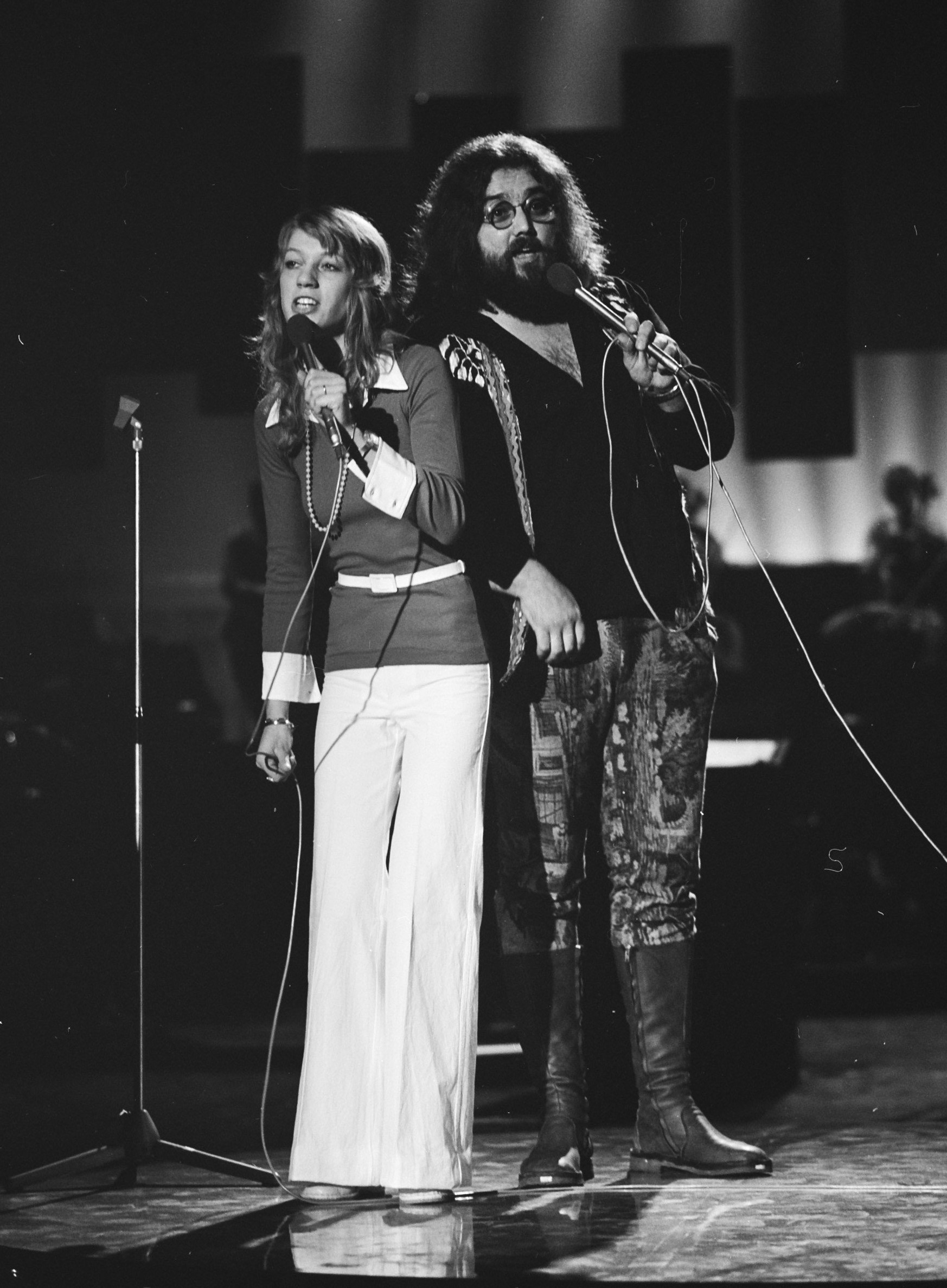 Collectie / Archief : Fotocollectie Anefo Reportage / Serie : Mouth en McNeal repeteren voor het Nationaal Songfestival Beschrijving : Het duo tijdens de repetitie Datum : 26 februari 1974 This file has been extracted from another file: Het duo tijdens de repetitie, Bestanddeelnr 927-0298.jpg Trefwoorden : repetities, zangeressen, zangers Persoonsnaam : Duyn, Willem, Spijker, Sjoukje van 't Instellingsnaam : Mouth and MacNeal, Nationaal Songfestival Fotograaf : Mieremet, Rob / Anefo Auteursrechthebbende : Nationaal Archief Materiaalsoort : Negatief (zwart/wit) Nummer archiefinventaris : bekijk toegang 2.24.01.03 Bestanddeelnummer : 927-0298 Reacties Geplaatst door Maaike op 28 augustus 2012 - 16:03. locatie: Jaarbeurs Congrescentrum te Utrecht